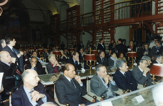 Consegna alla Camera dei deputati da parte della Fondazione Craxi delle carte dell'archivio privato di Bettino Craxi